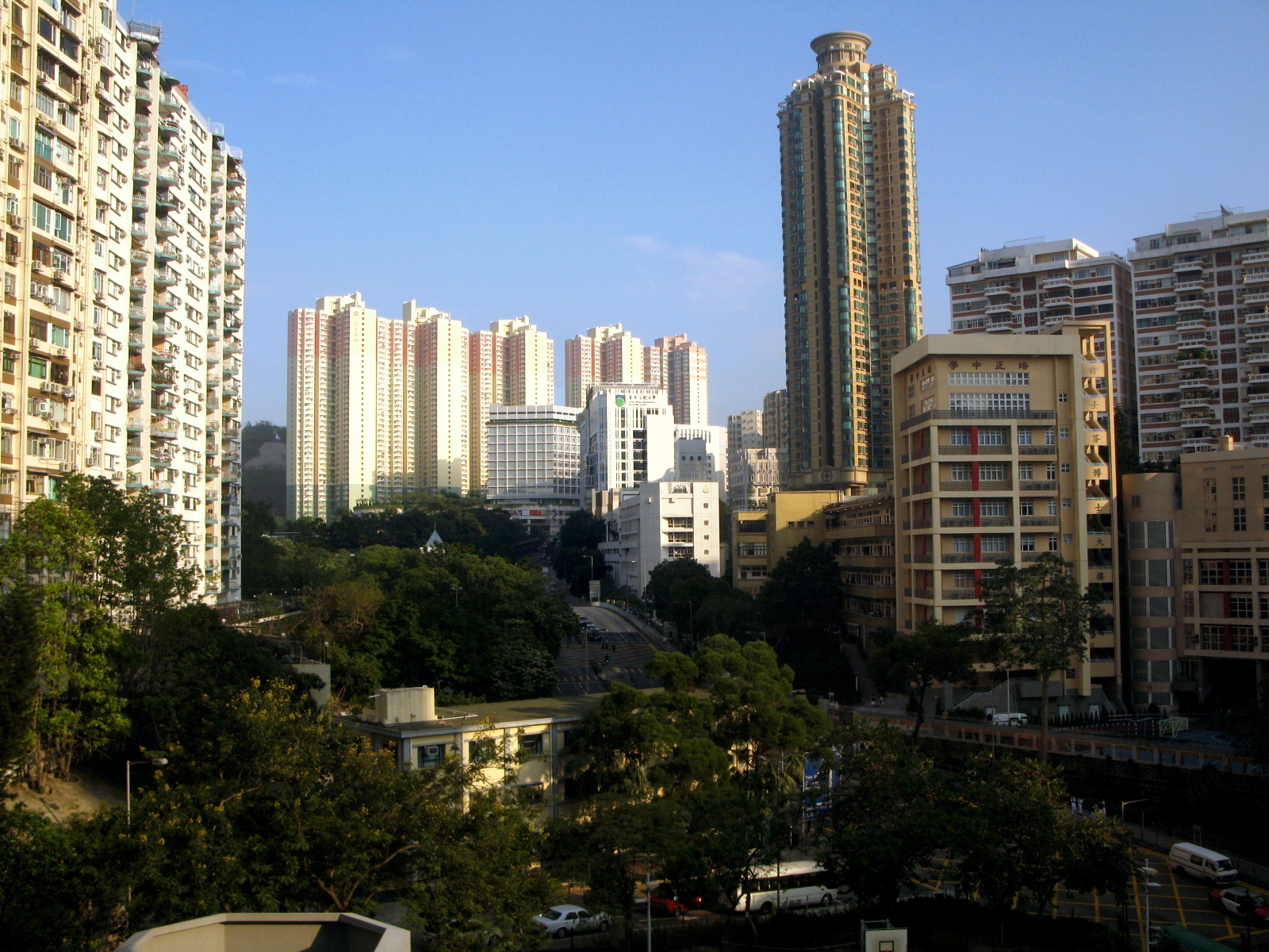 Ho Man Tin 何文田